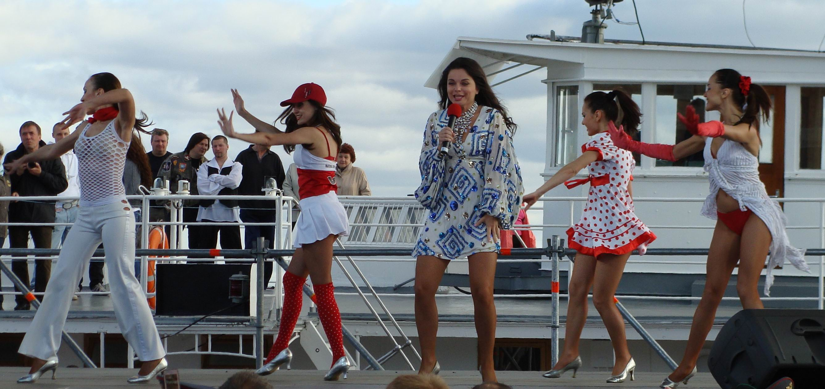 Наташа Королёва в Архангельске выступает совместно с программой Регины Дубовицкой - "Аншлаг" на юбилее, 425-летии города, в воскресенье, летом 28 июня 2009 года.